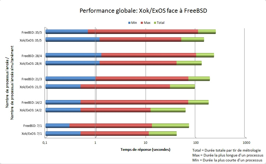 Perf-GLOBALES-final1